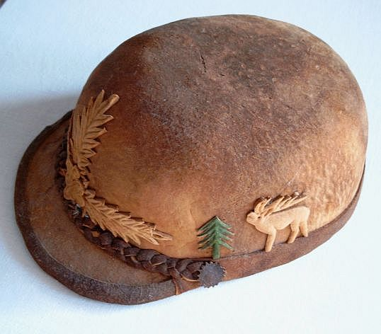 Kappe aus weichgeklopfter Trama (plektenchymatisches „Fruchtkörperfleisch“) des Zunderschwamms Fomes fomentarius, angefertigt in Rumänien